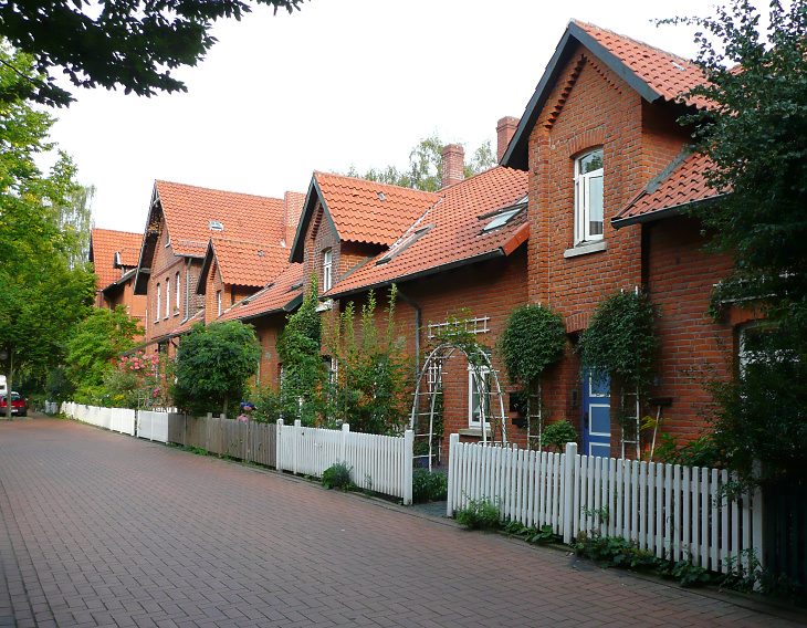 Werkssiedlung Döhrener Jammer in Hannover